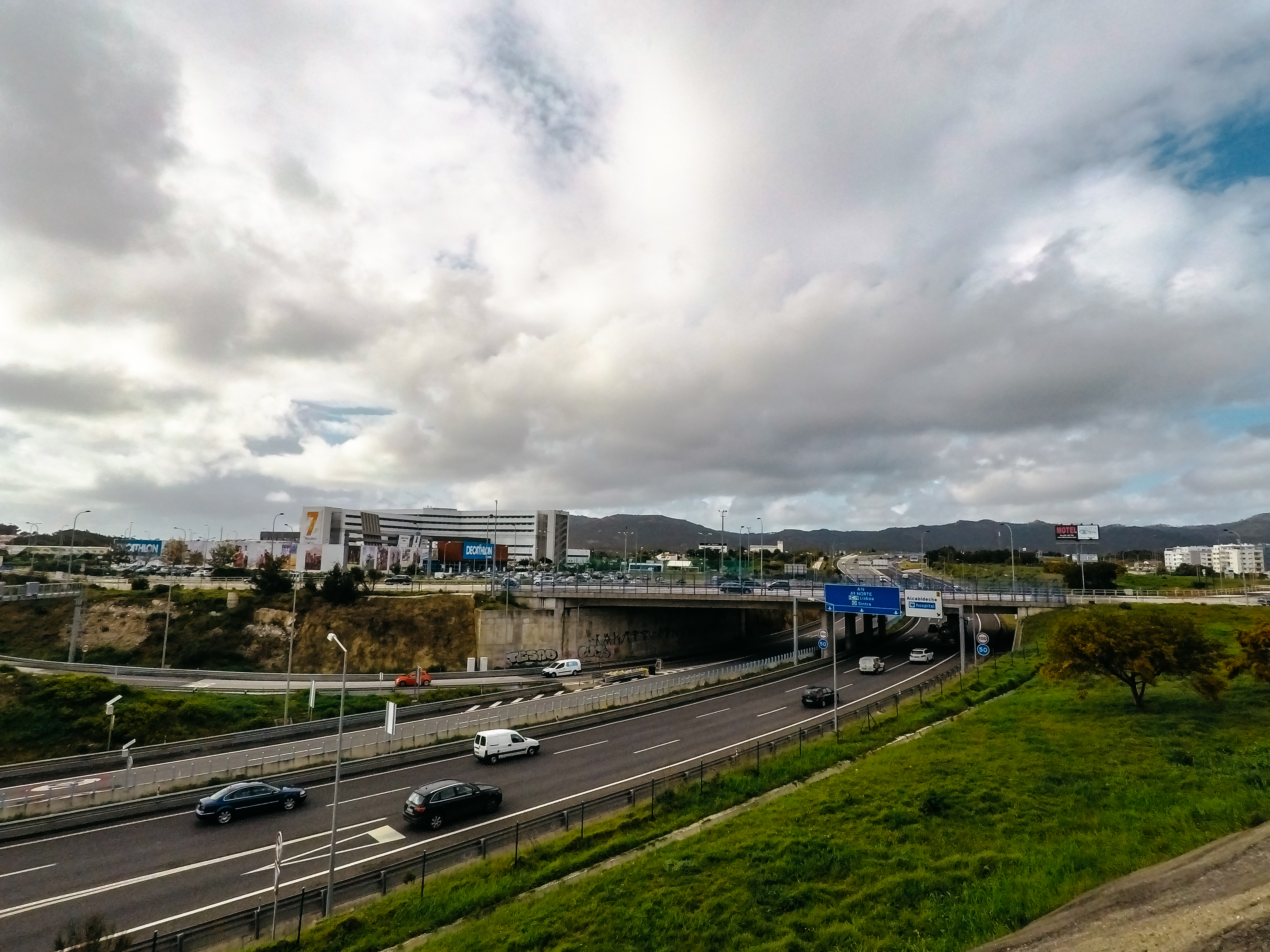 A16 à passagem por Alcabideche.